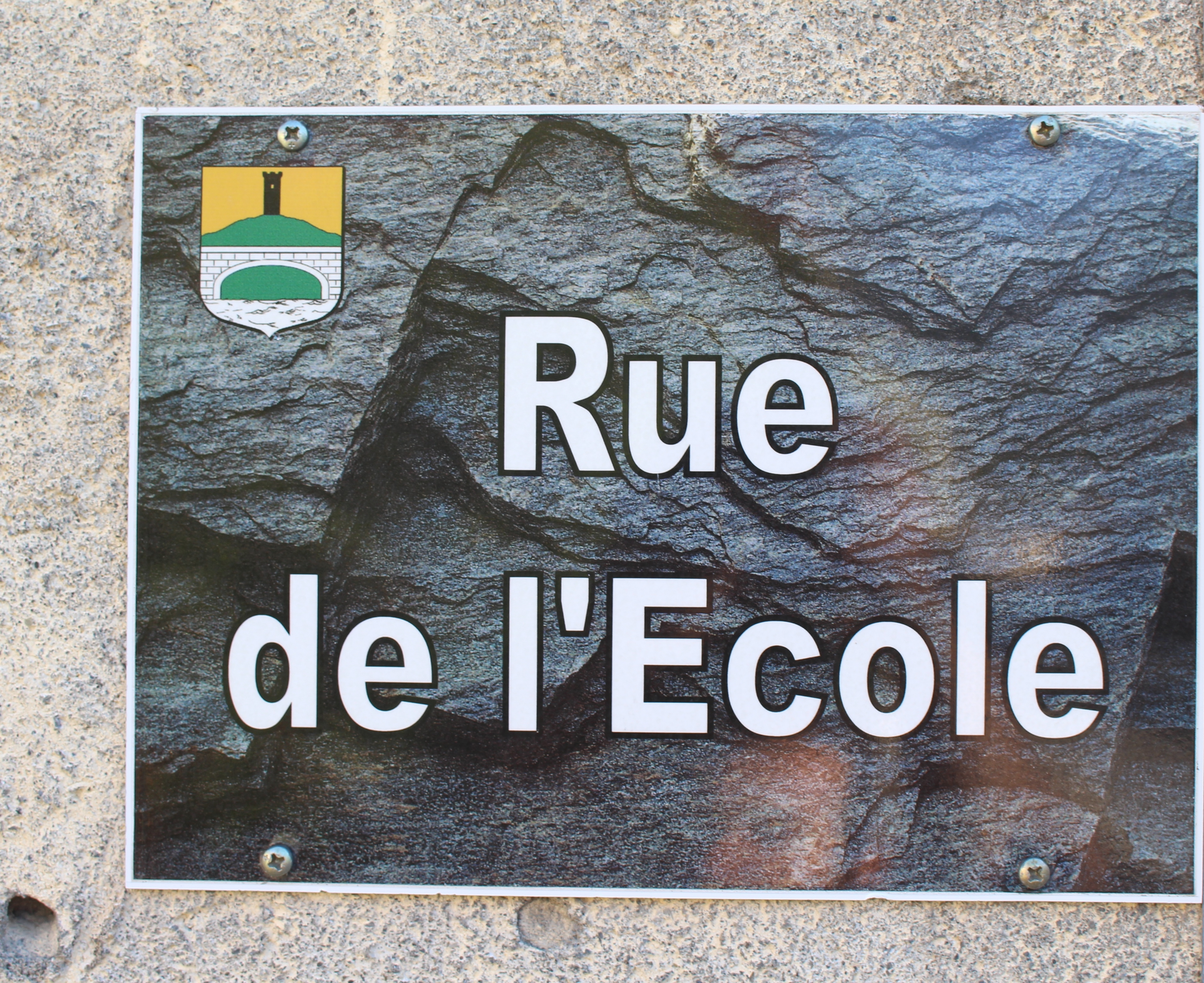 Rue du village de Hèches (Hautes-Pyrénées)